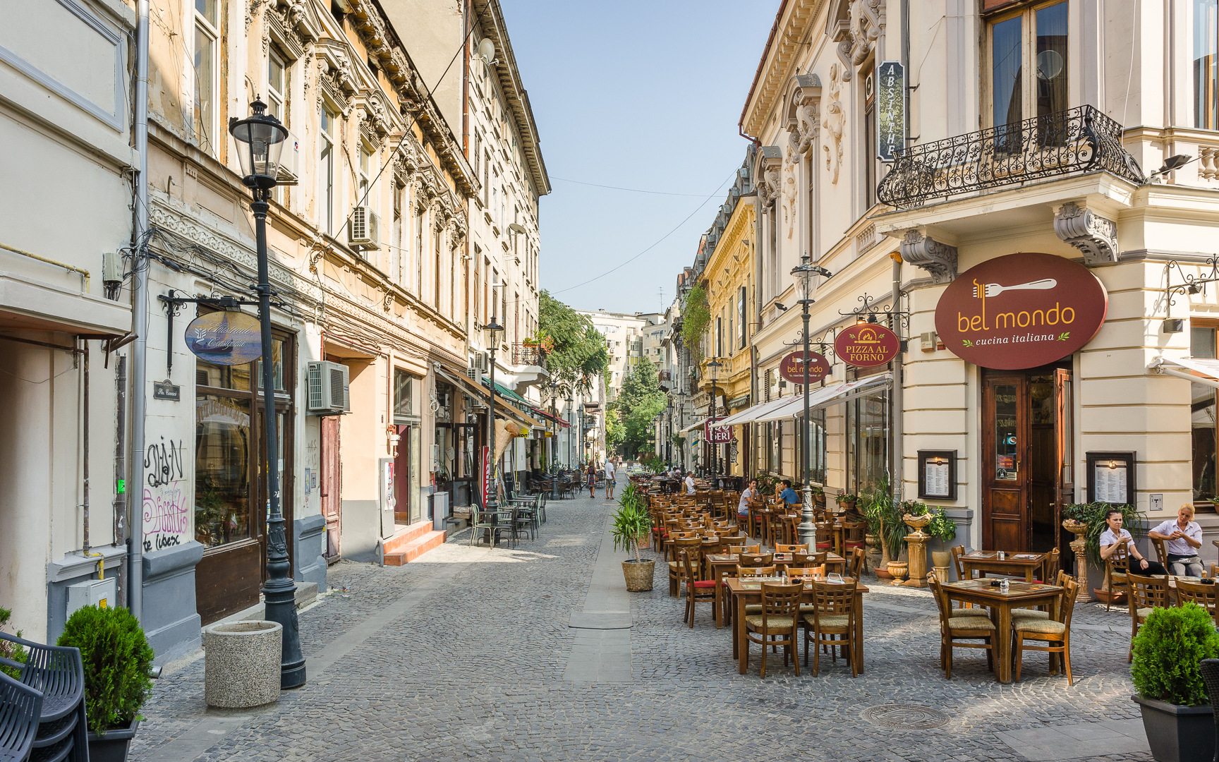 Strada Covaci, Bucuresti